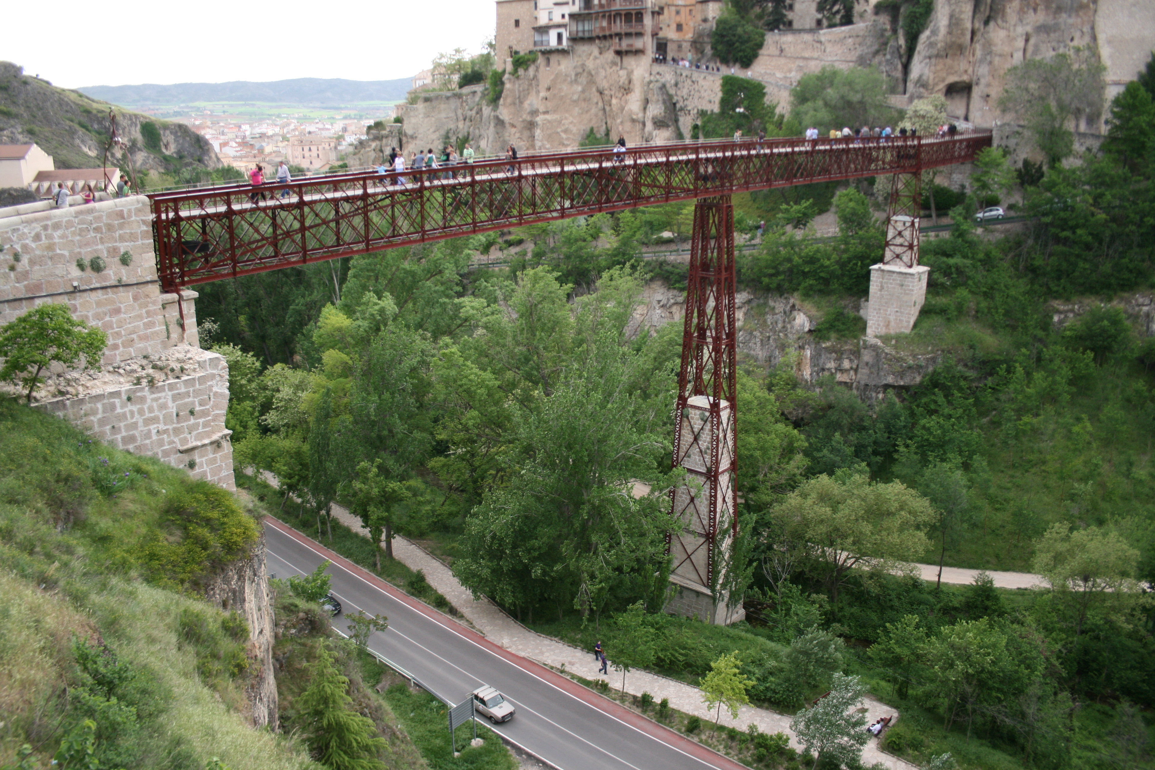 Puente de San Pablo (Cuenca)